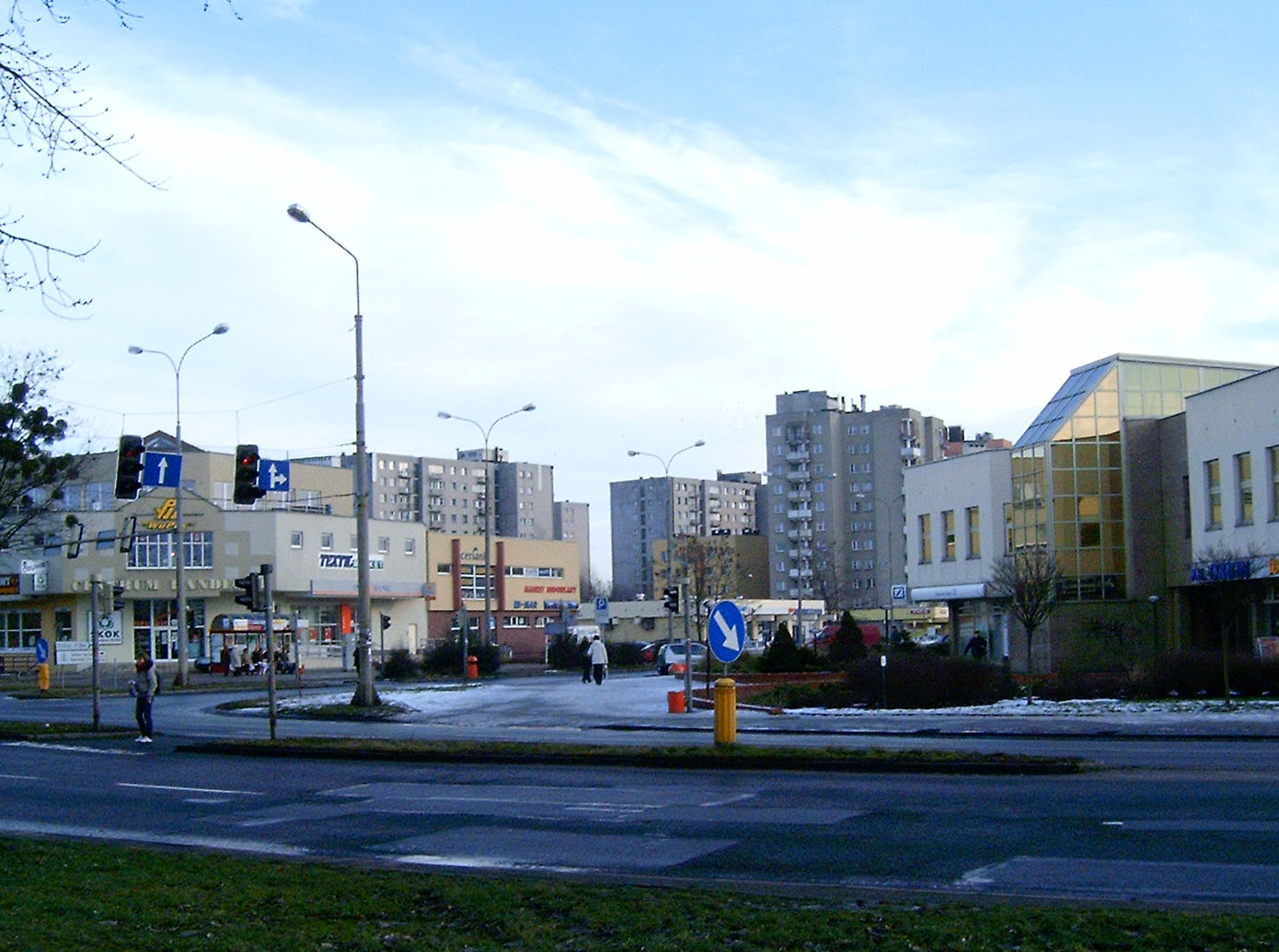 Kędzierzyn (Aleja Jana Pawła II) - dzielnica Kędzierzyna-Koźla, woj. opolskie, Polska.